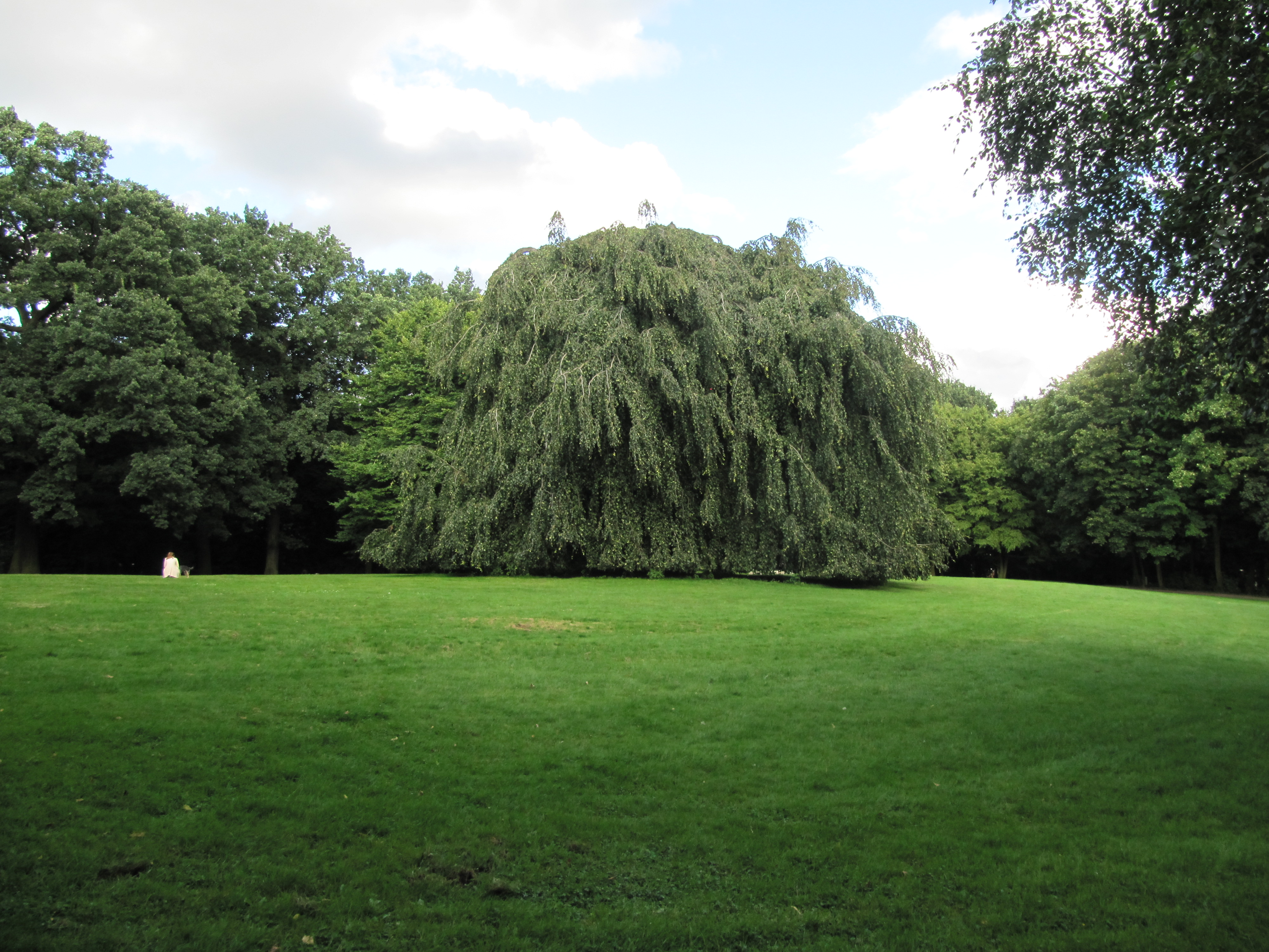 Blohms Park Hamburg-Horn 4